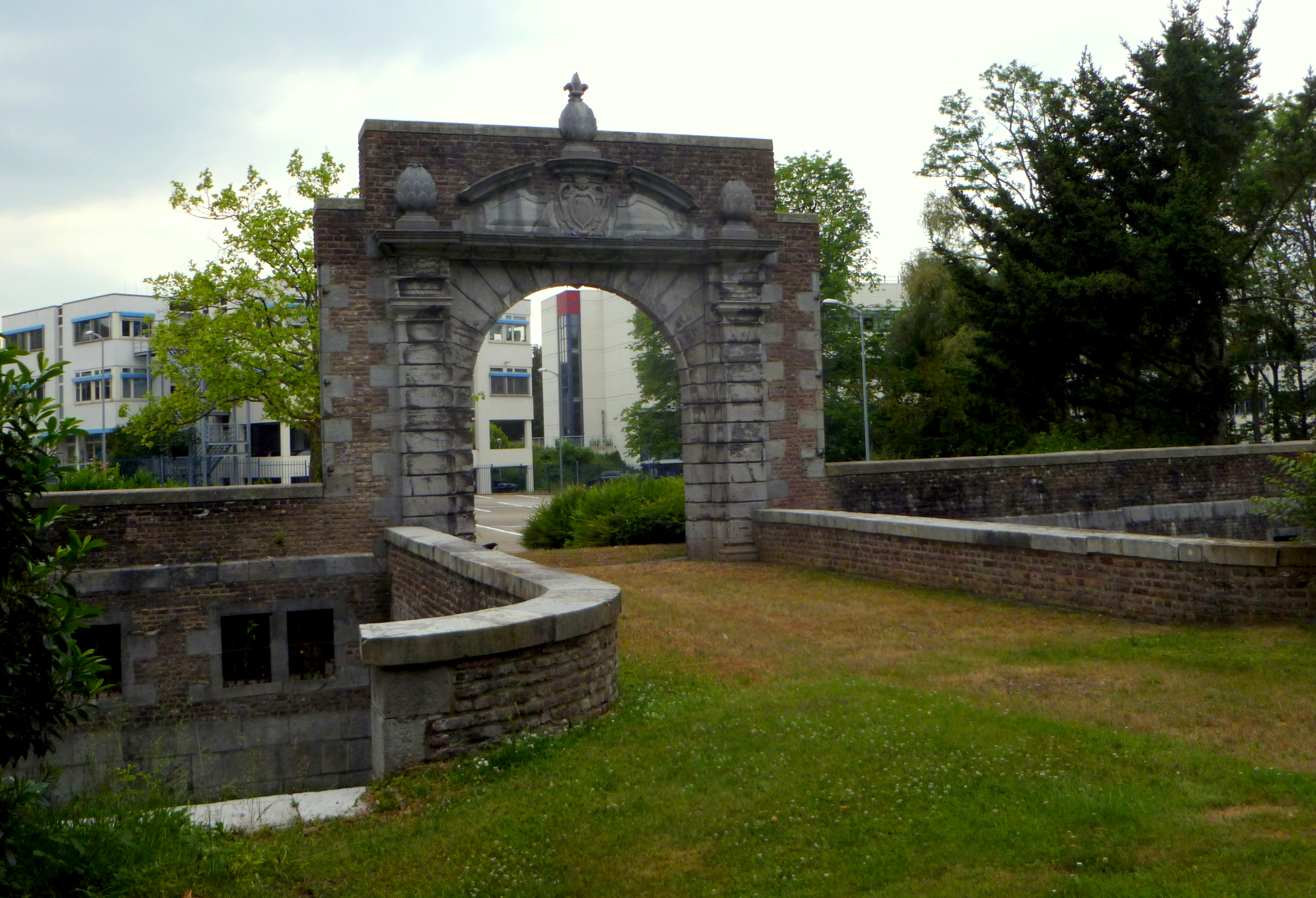 Eingangstor zum ehemaligen Bodenhof in der Eupener Straße Nr. 30; Baudenkmal in Aachen